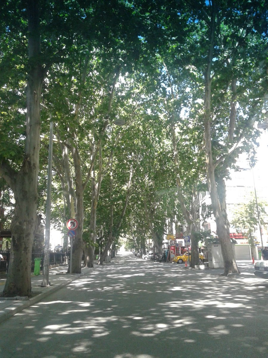 Bir sokak başı görünümde; Kumrular Caddesi, 5 Temmuz 2016.